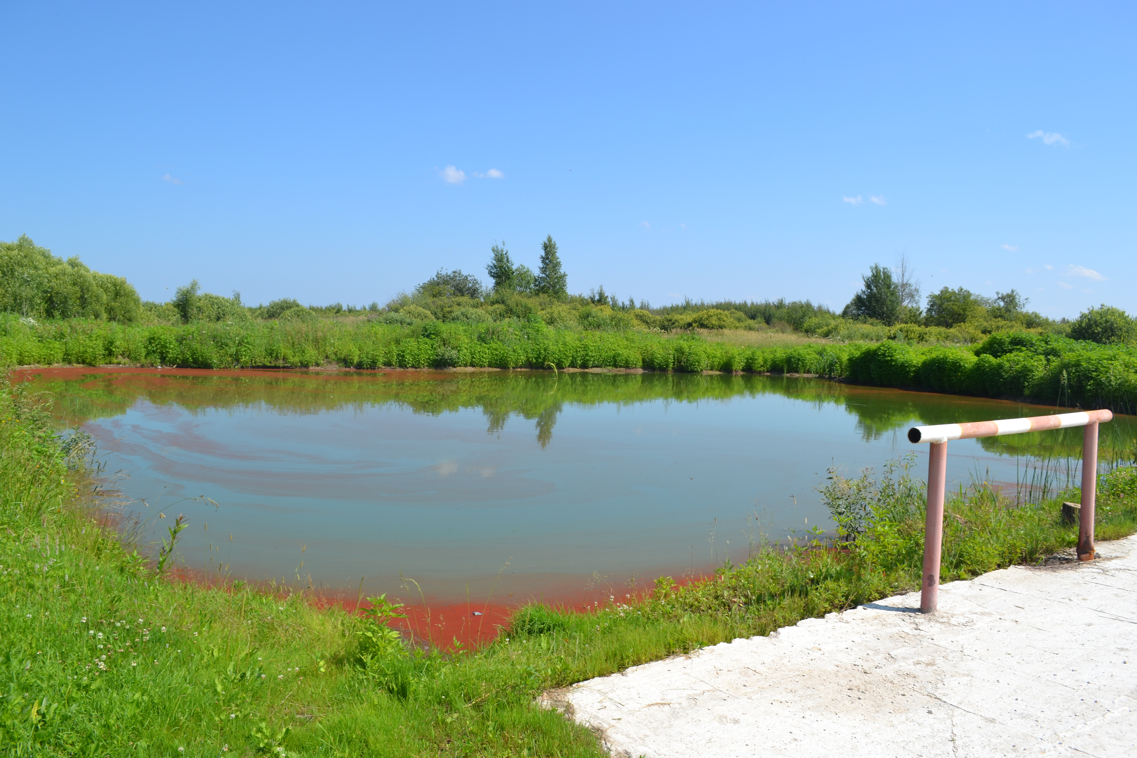 Пруд в деревне Старо-Черкасово (Шатурский район)